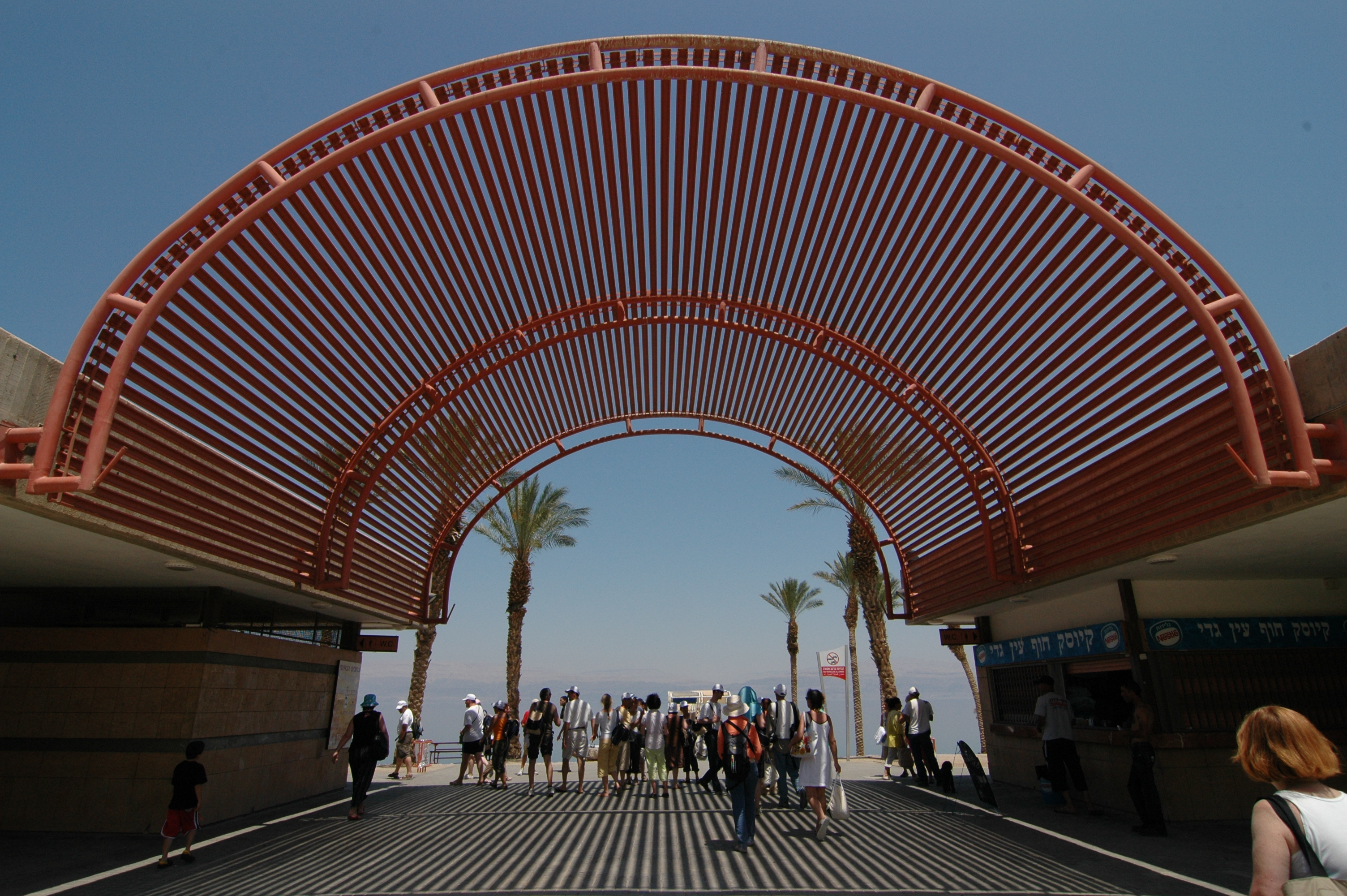 Masada